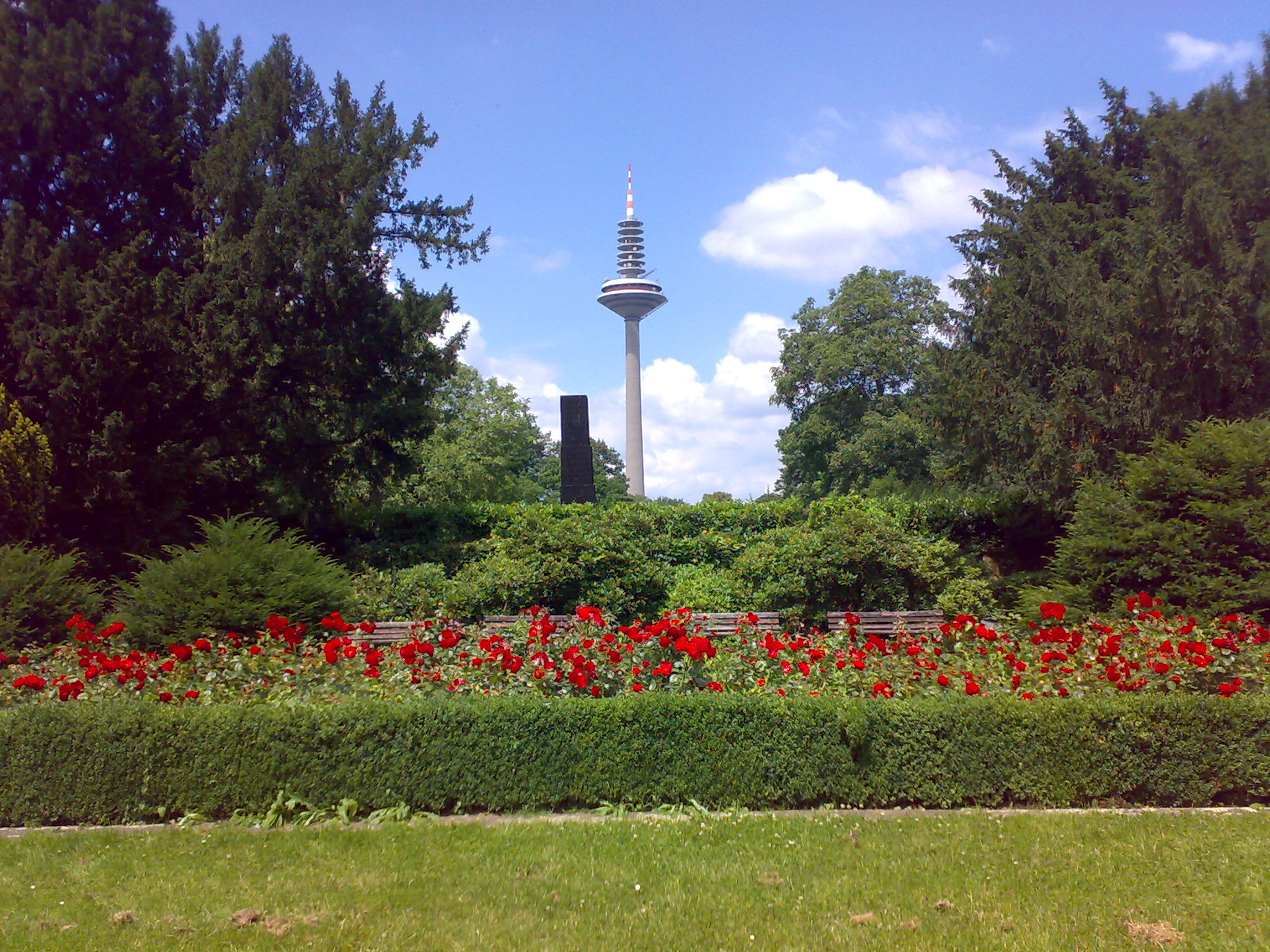 Frankfurt am Main, Grüneburgpark, Gedenkstele 1978 von Hans Steinbrenner auf der Mittelterrasse im Grüneburgpark errichtet. Die 5 Meter hohe Stele aus afrikanischem "Cabala"-Holz erinnert an das "Neue Palais" von Amschel Mayer Freiherr von Rothschild (1845)